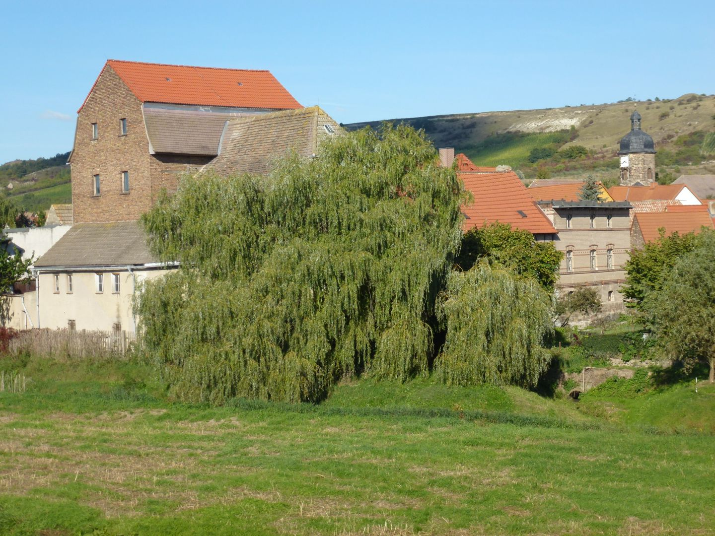 Blick von der Unstrutbrücke auf Karsdorf